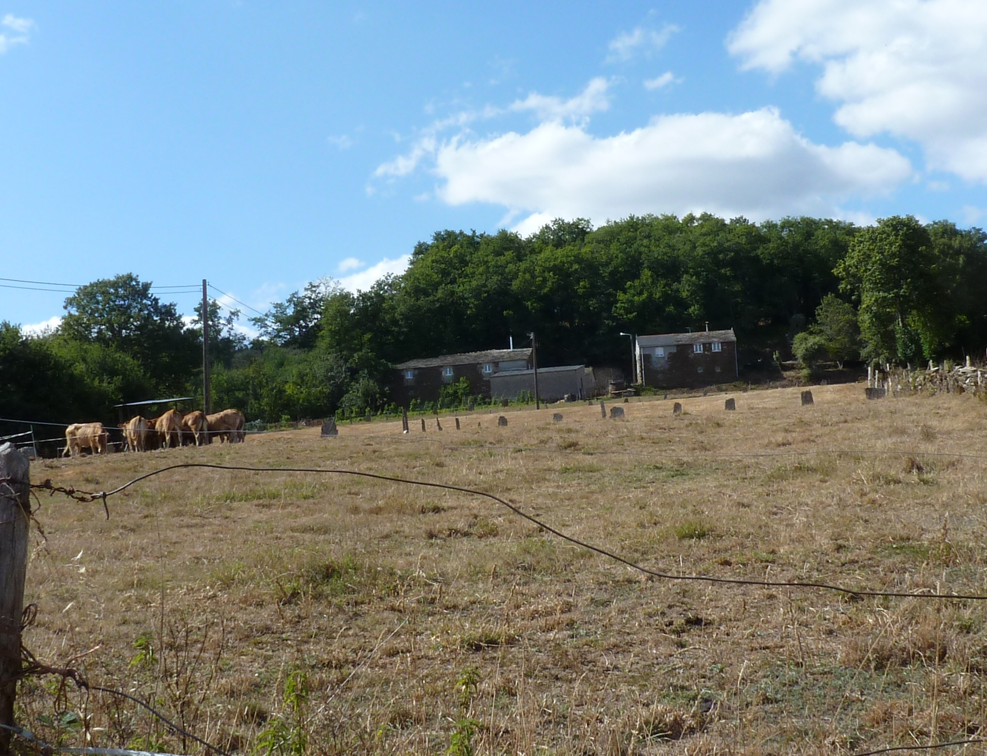 Lugar da Penela, parroquia da Cervela, concello do Incio, Lugo